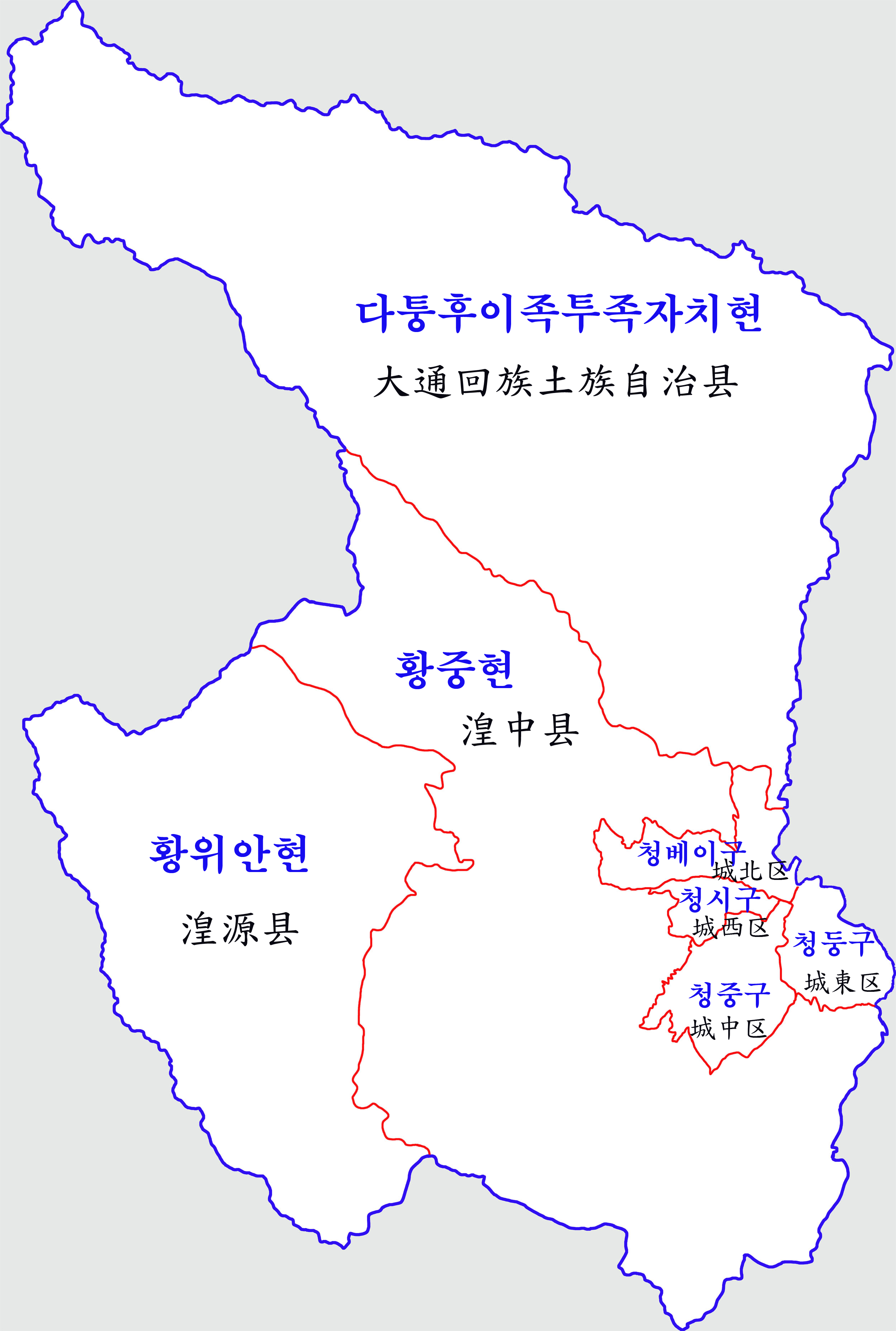 시닝시 행정구역